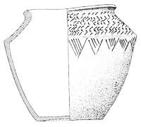 La Feuillée : vase décoré trouvé dans un tumulus de Ruguellou (dessin par Paul du Chatellier), d'après